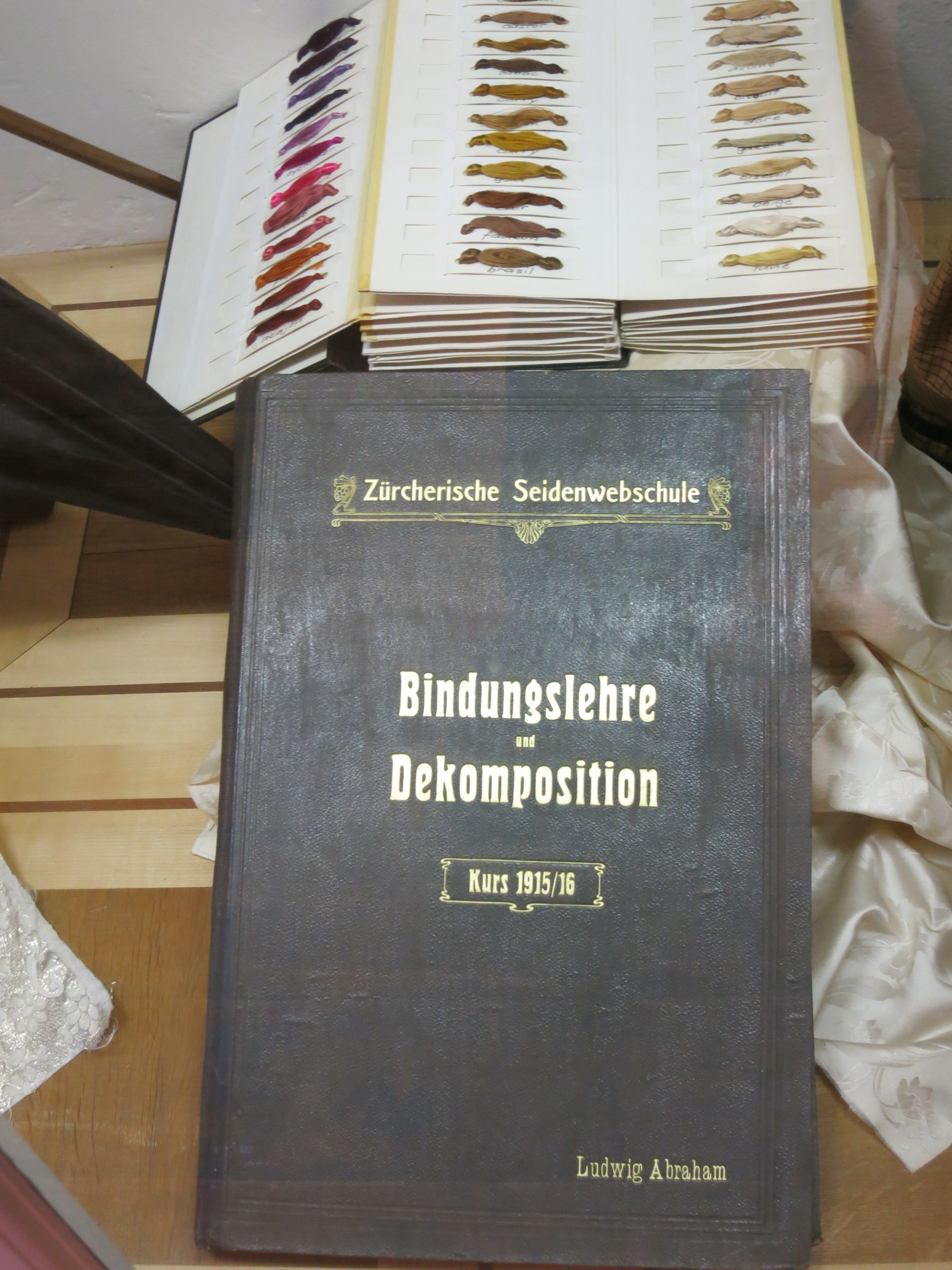 Zürcherische Seidenwebschule Kurs 1915-16, Zürich, Schweiz